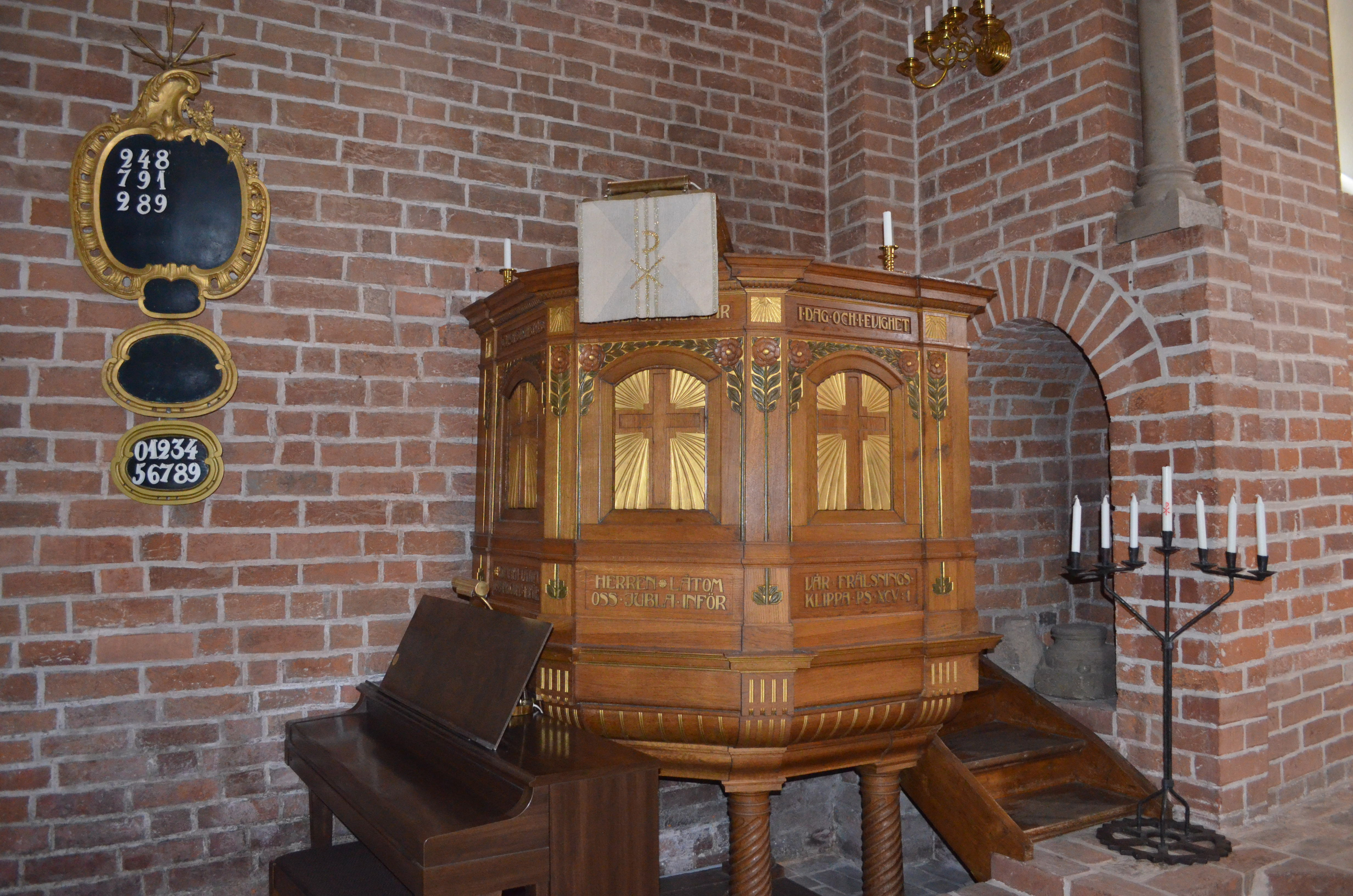 predikstol